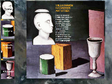 Bildschirmfoto von